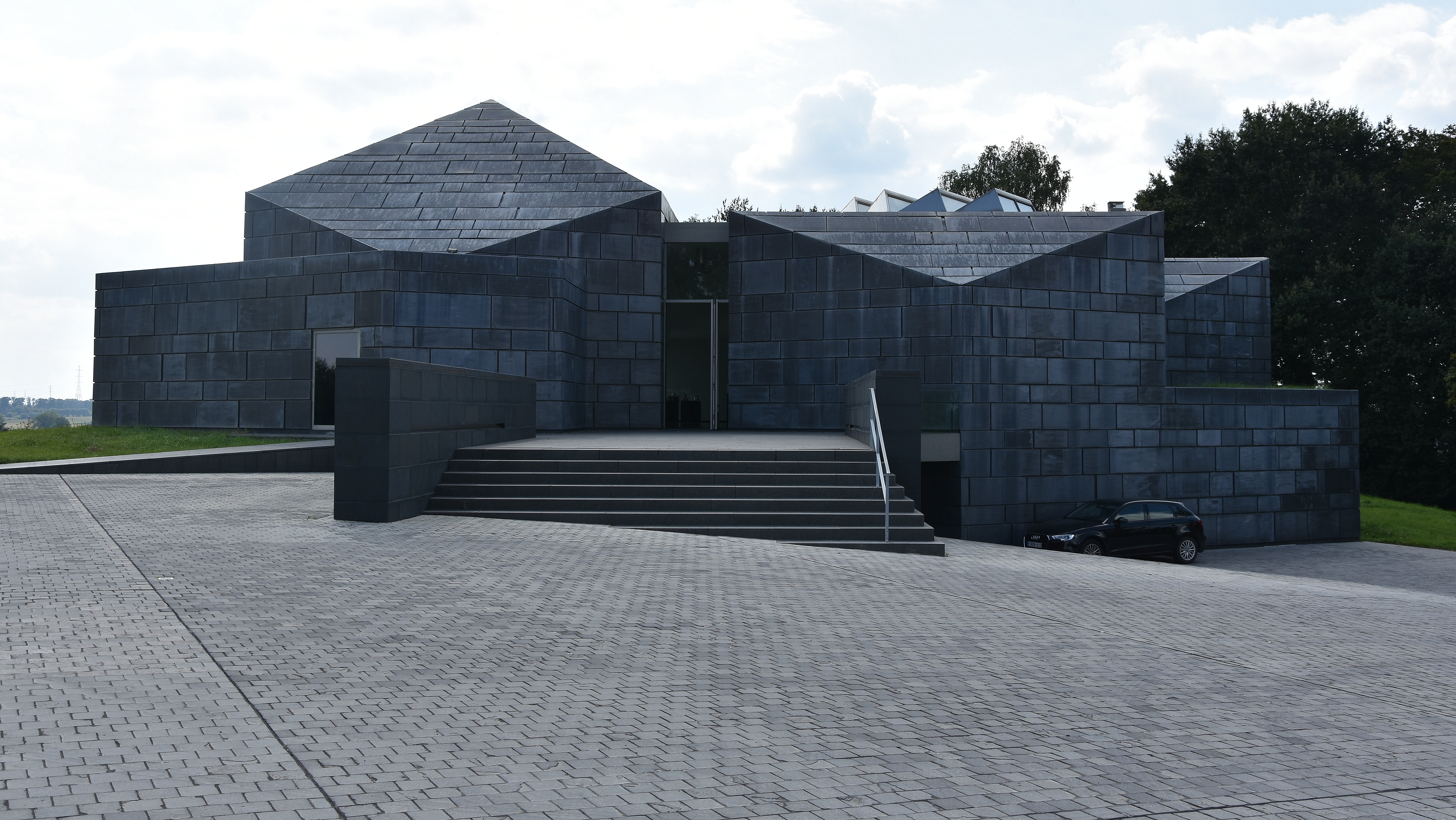 SONS Kruishoutem 10-09-2019 15-28-012 This photo of immovable heritage has been taken in the Flemish Region